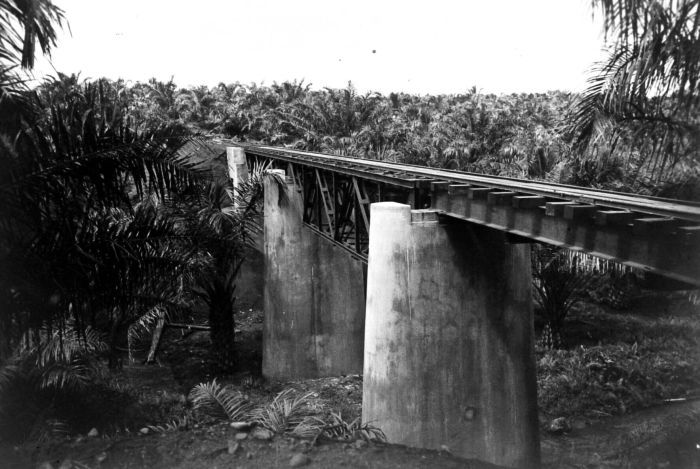 Repronegatief. Een brug over de rivier Moesi bij Tebingtinggi in Zuid-Sumatra